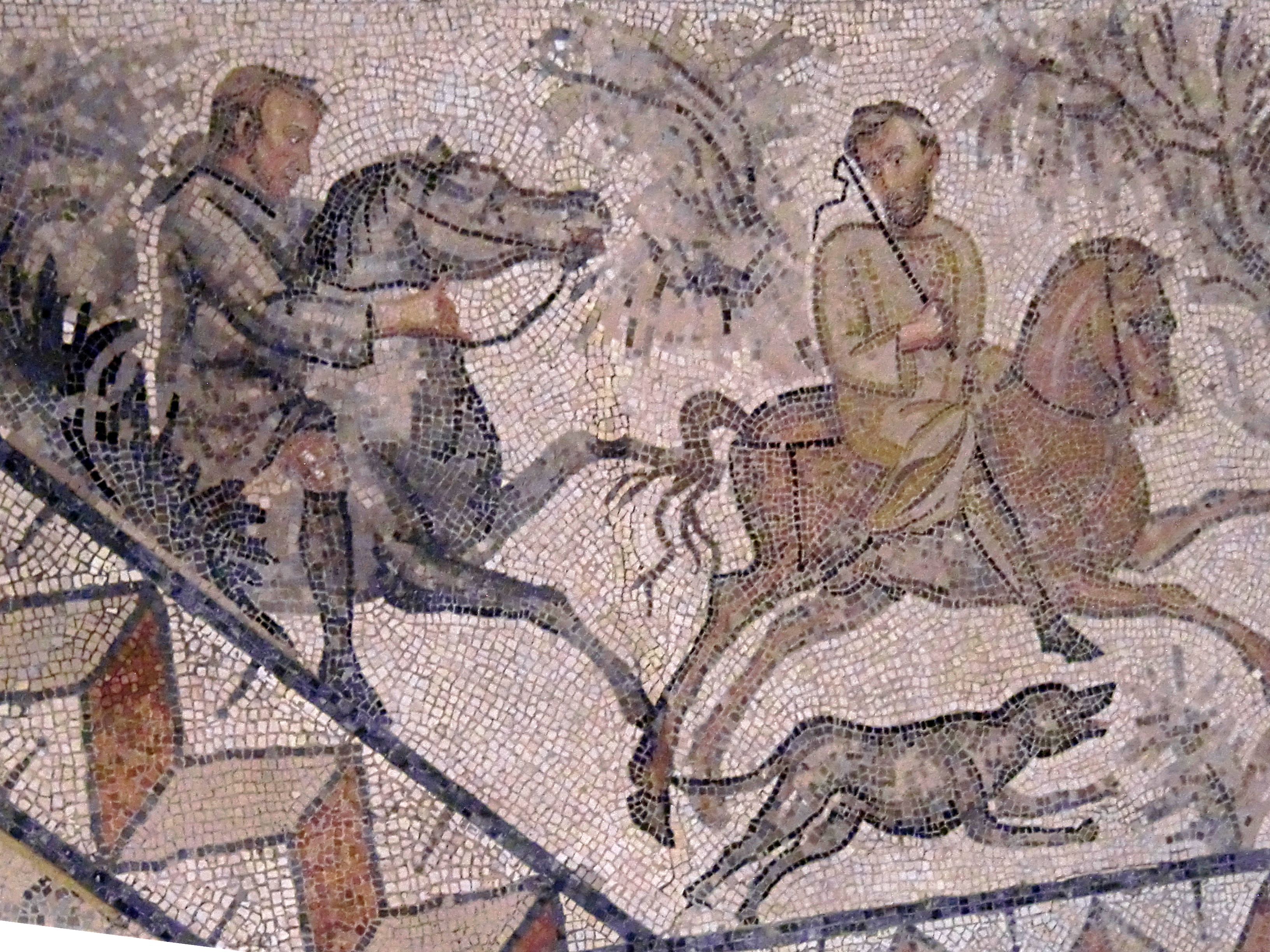 Mosaïque de Lillebonne - détail